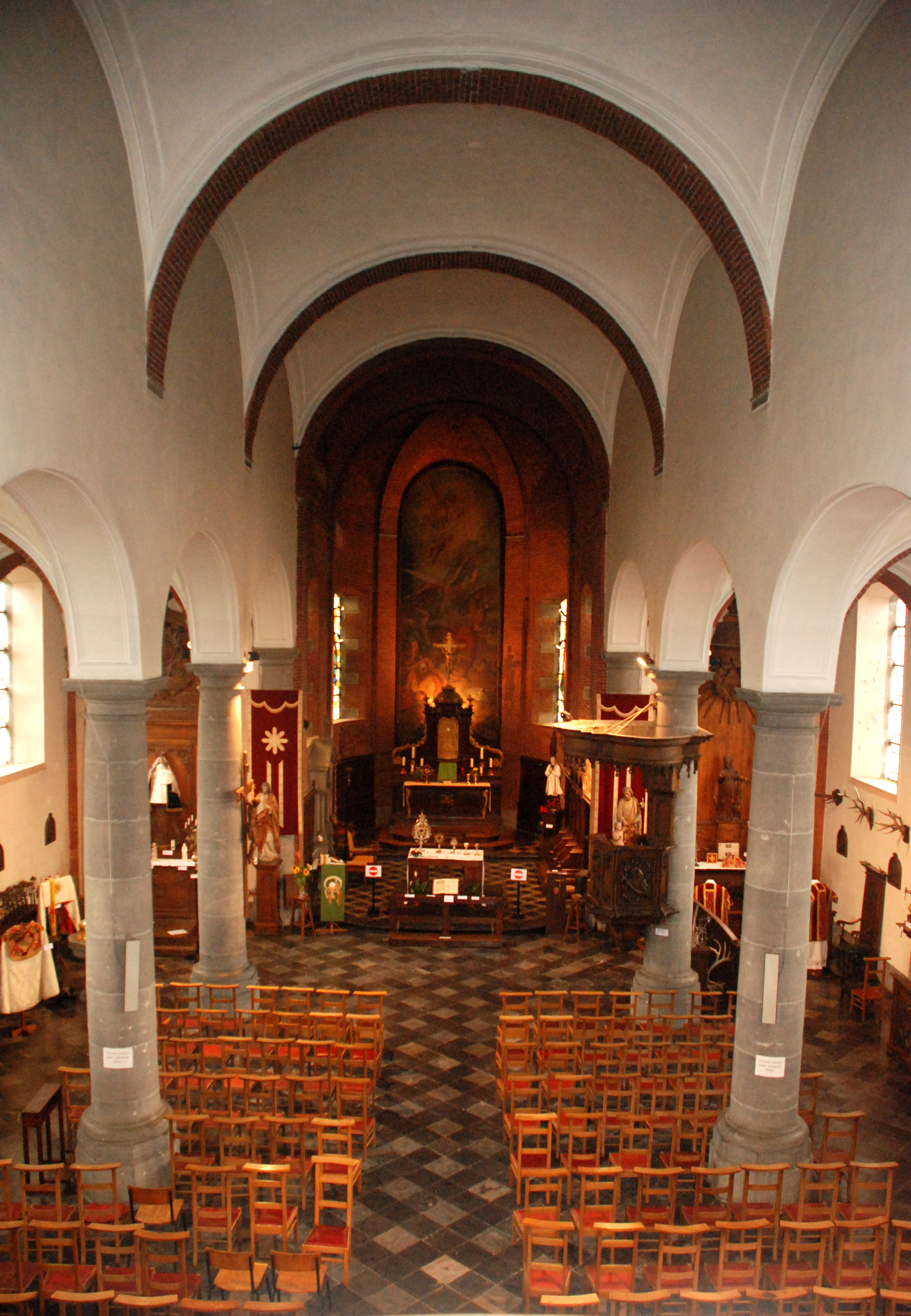 Belgique - Brabant wallon - Genappe - Baisy-Thy - Église Saint-Hubert